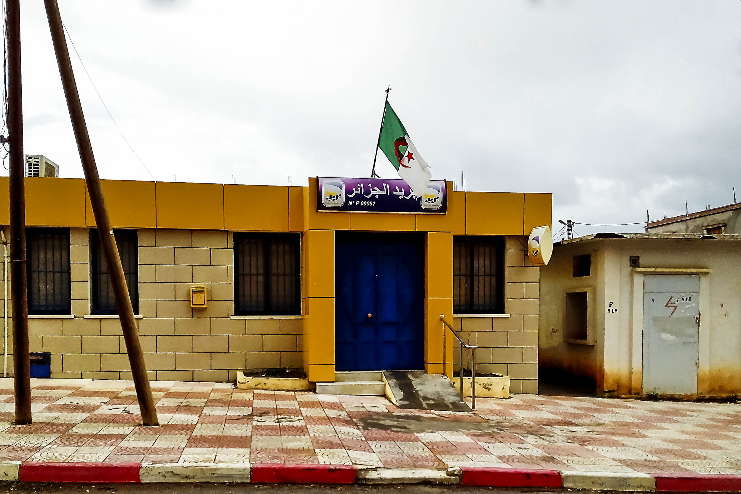 Bureau de Poste Sidi Madani, Chiffa, wilaya de Blida, Algerie مكتب بريد سيدي المدني بلدية شفة بولاية البليدة، الجزائر